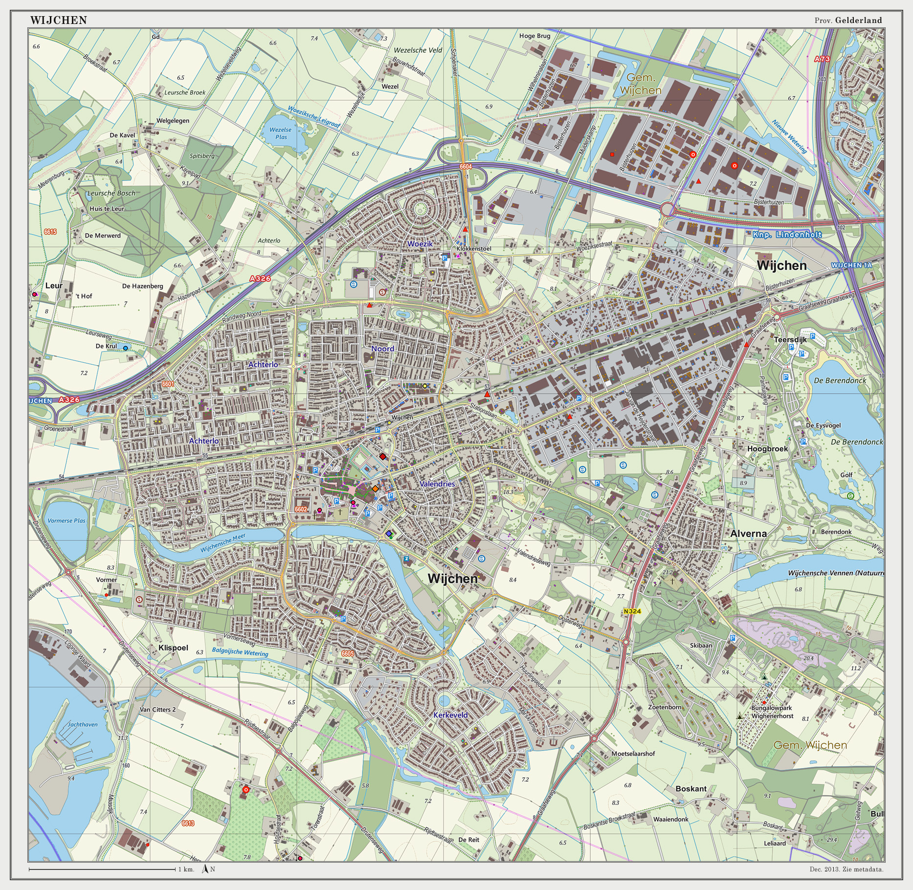 Topografische kaart van Wijchen (woonplaats). Kaartbeeld samengesteld op basis van de GML open geodata van de Top10NL en Top25namen (Basisregistratie Topografie, Kadaster 30-nov-2013), o.b.v. Creative Commons BY licentie. Gebouwvlakken uit Open Geodata BAG extract (8-dec-2013). Wegen uit de Open Street Map (15-dec-2013). Samenstelling en kleurenschema: Jan-Willem van Aalst, met QGIS2 en Adobe Photoshop. Zie ook de Legenda.